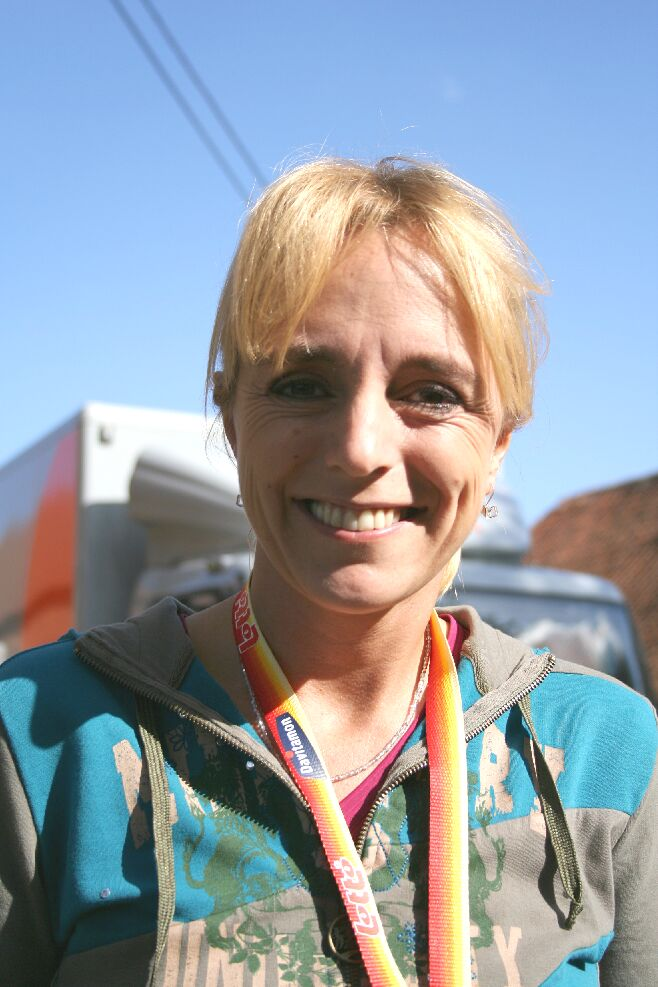 Gemaakt door Tim Freh op te buitenopname's van Fc De Kampioenen met de Canon EOS 350D